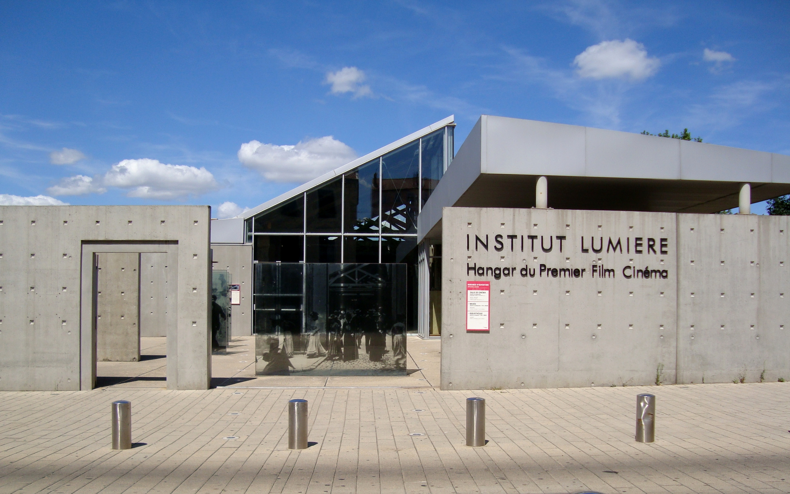 Le cinéma de l'Institut Lumière à Lyon, installé dans le Hangar du Premier-Film.